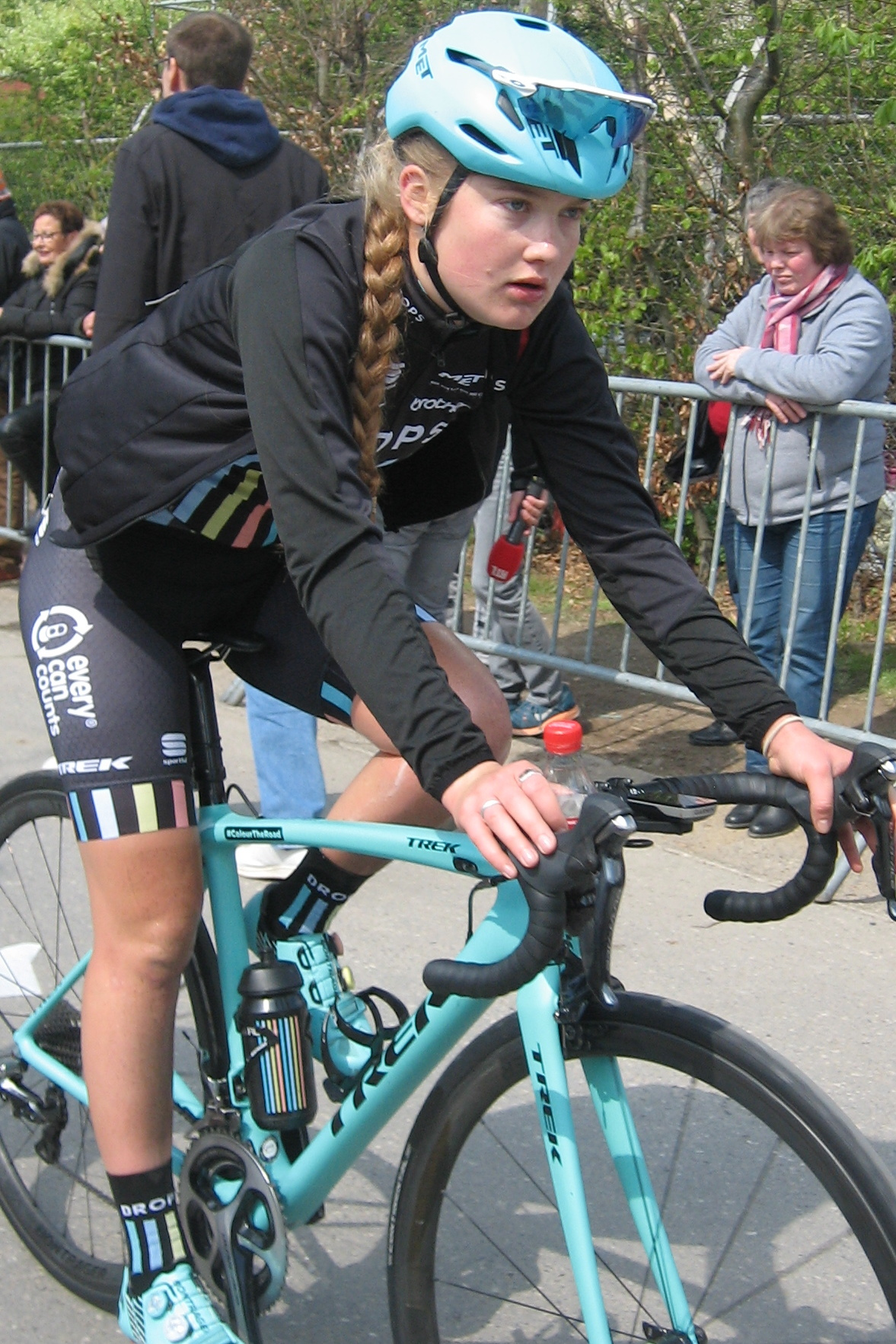 Finish van de Waalse Pijl 2017 in Huy.